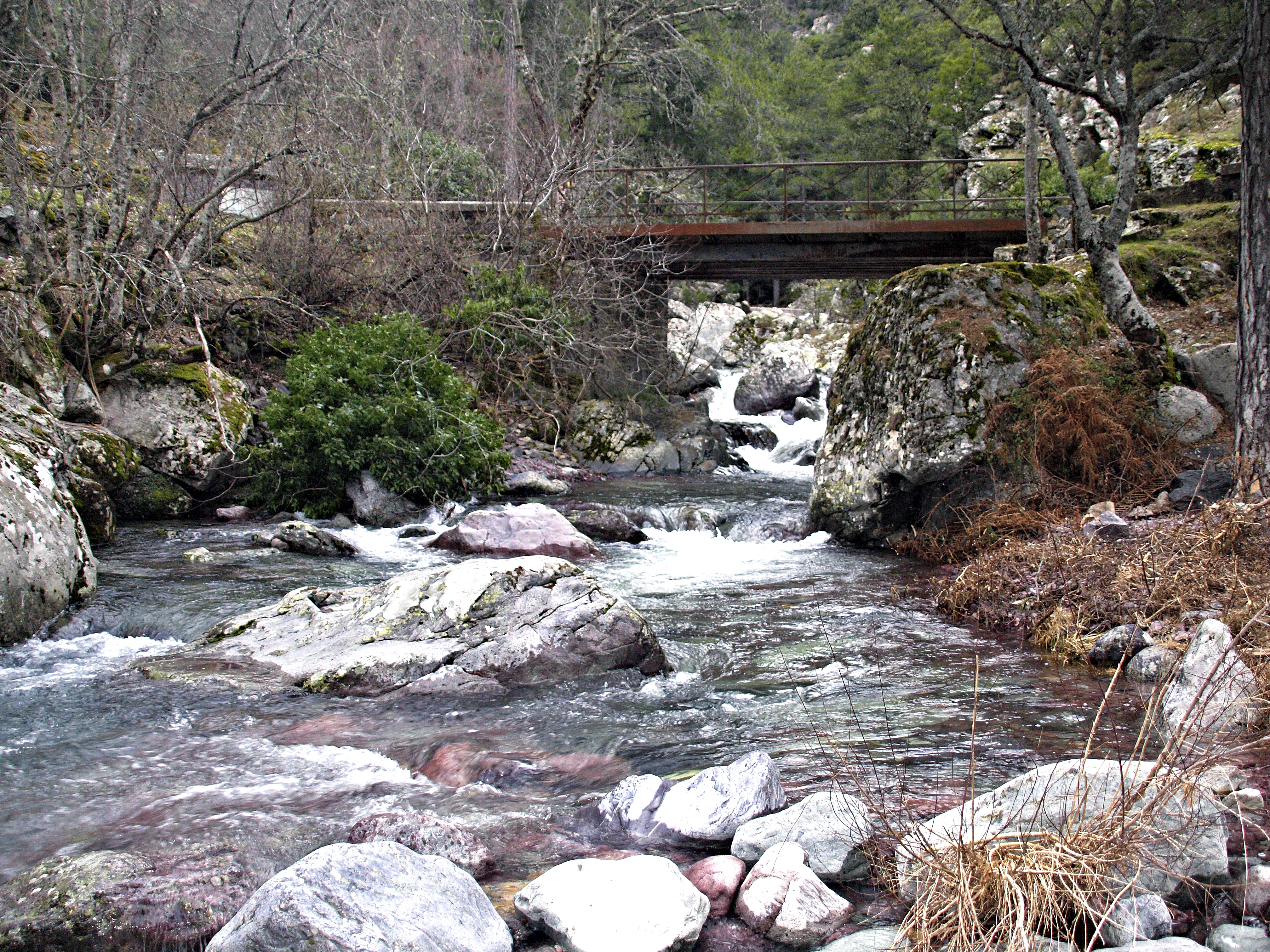 Olmi-Cappella (Corsica) - Pont D963 sur la Tartagine